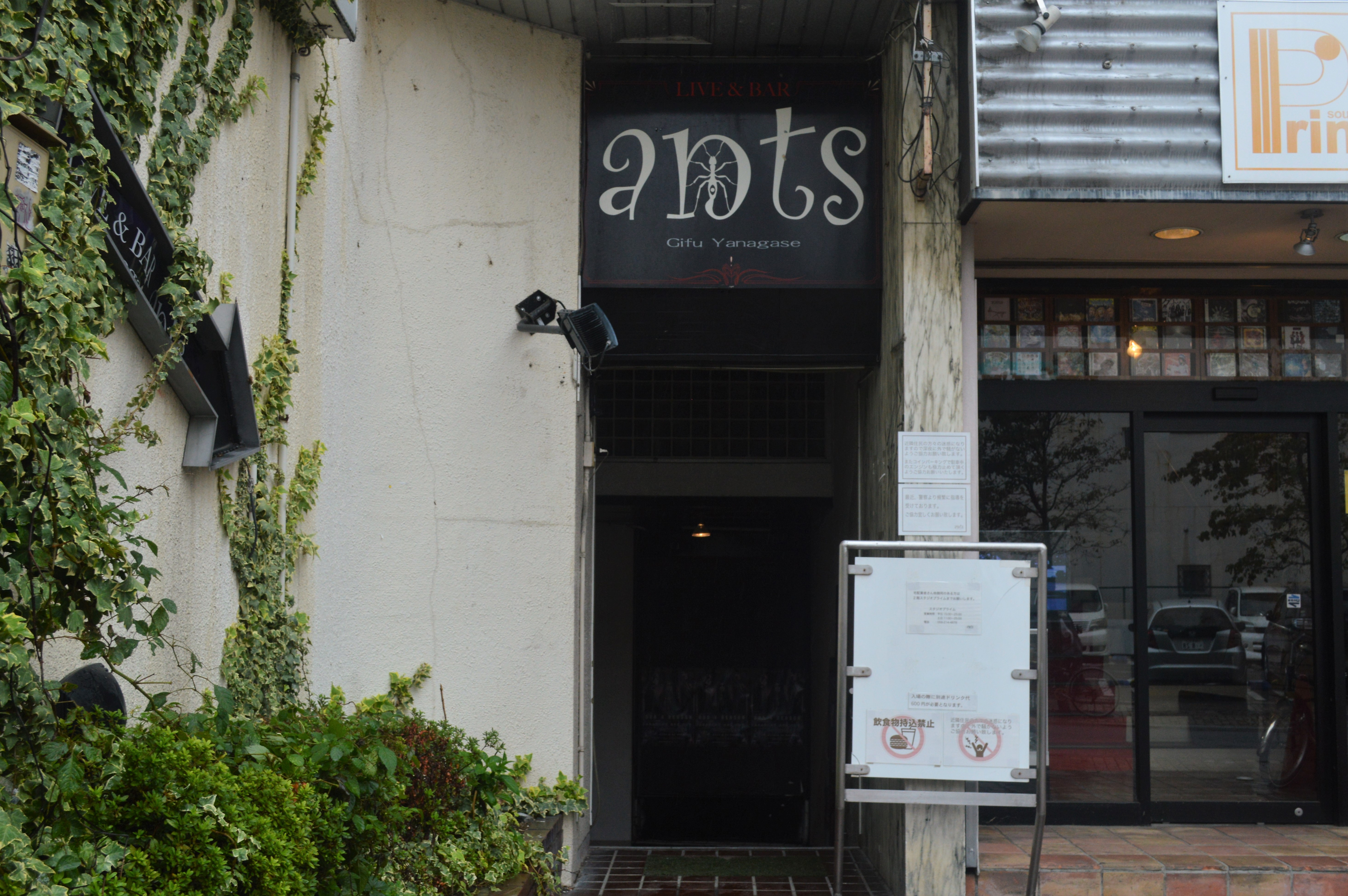 岐阜市柳ケ瀬通7丁目にある柳ヶ瀬Ants（柳ヶ瀬アンツ）。2011年オープンのライブハウス。